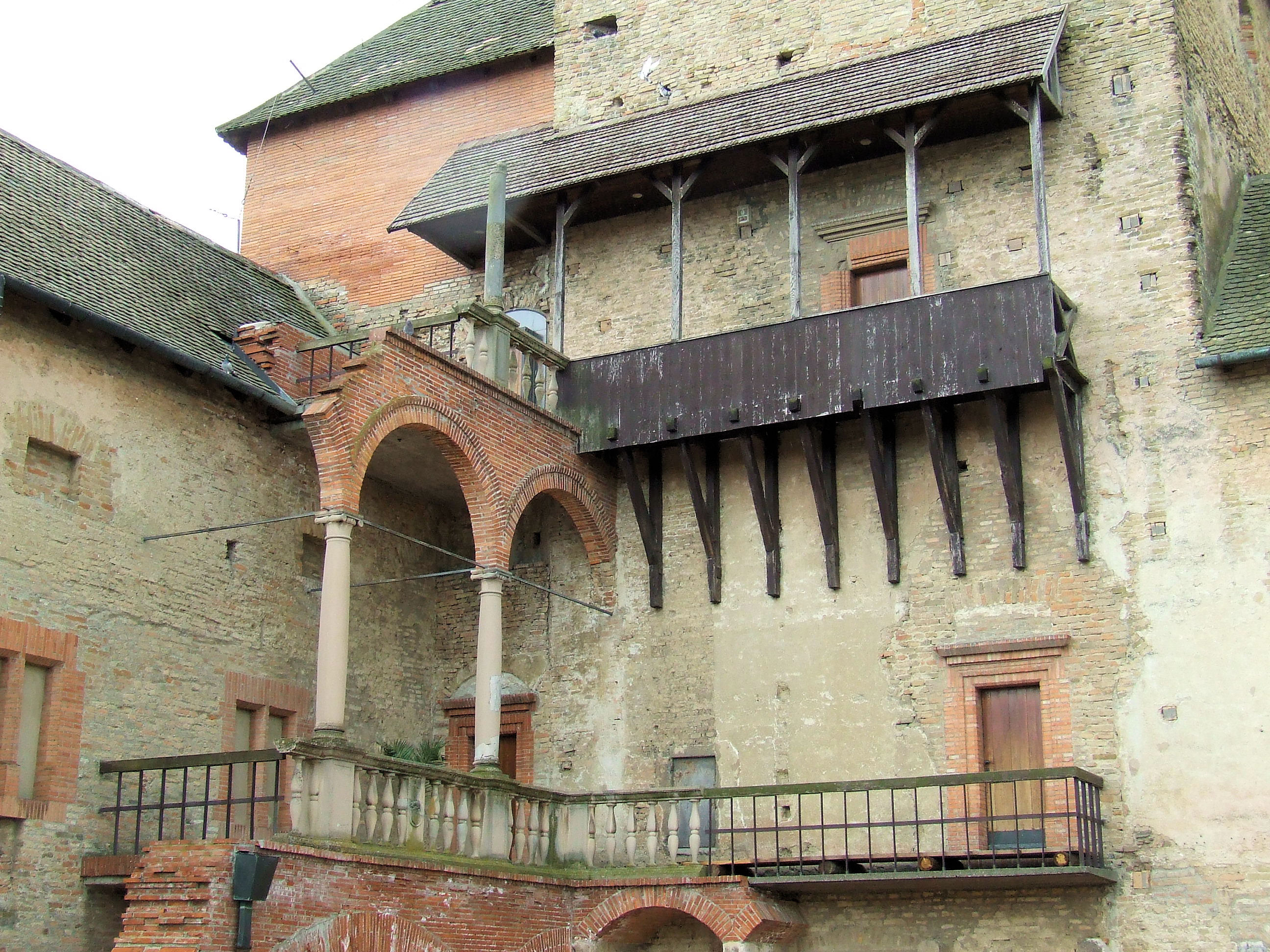 A simontornyai vár